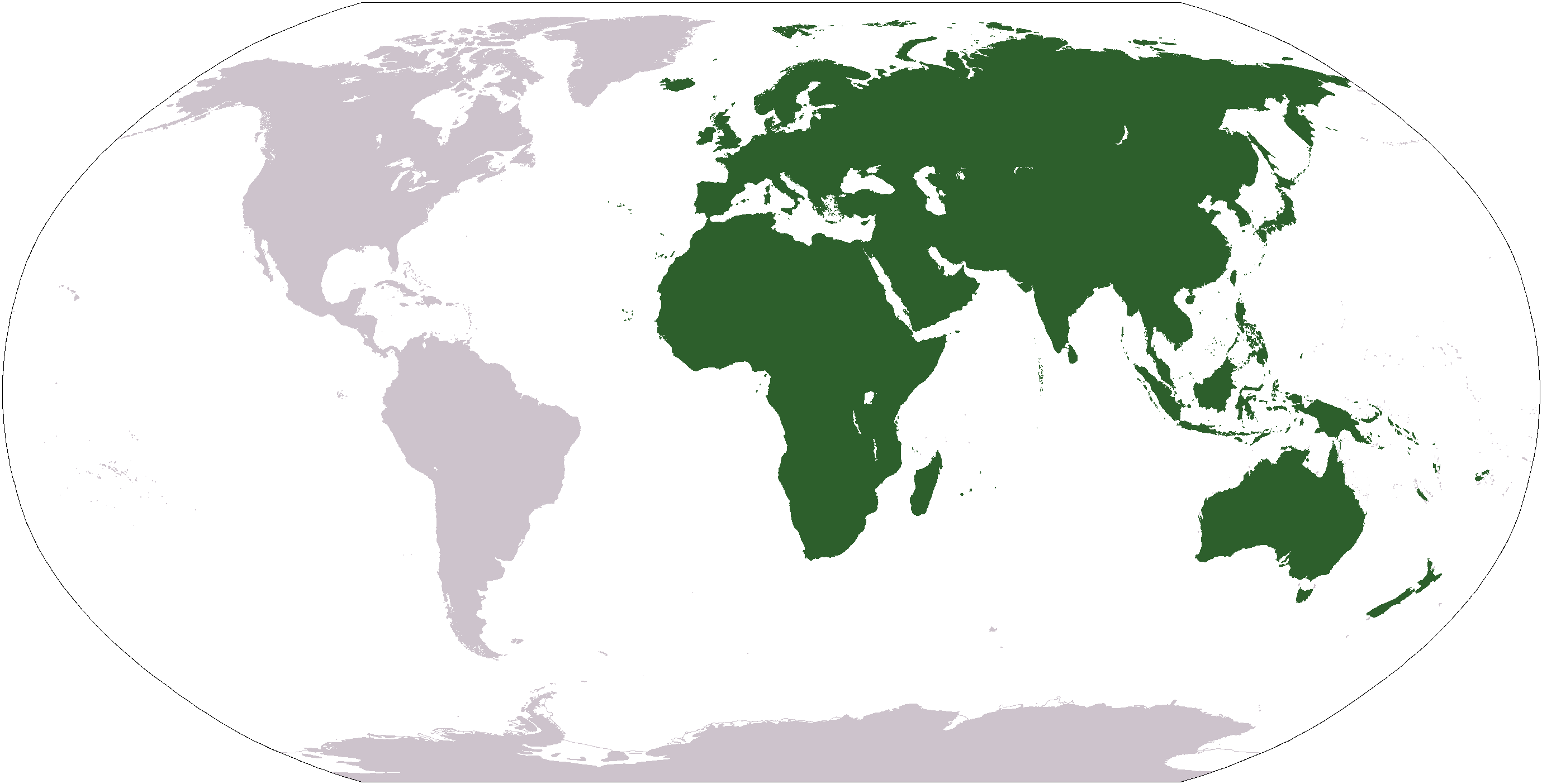 Ostefeste der Welt